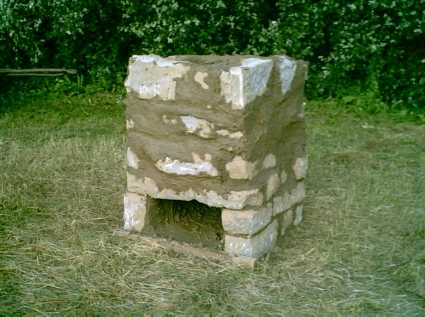 Ricostruzione sperimentale di n forno fusorio ispirato ai rinvenimenti di Acauq Fredda al Passo di Redebus (TN)